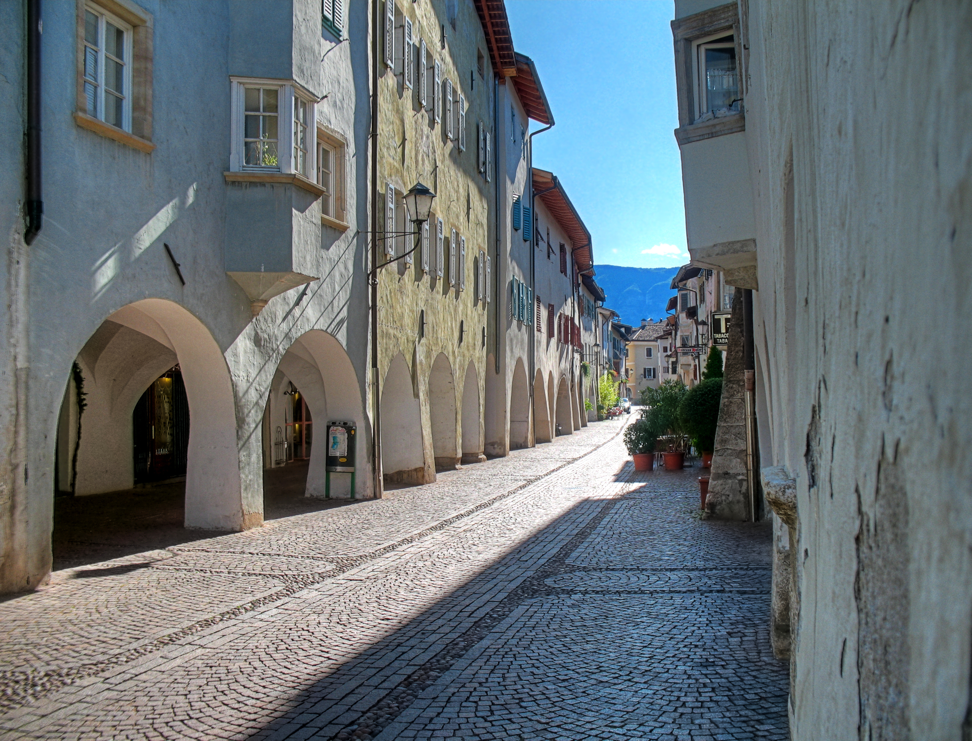 Italien, Südtirol, Neumarkt (Egna), Andreas-Hofer-Straße